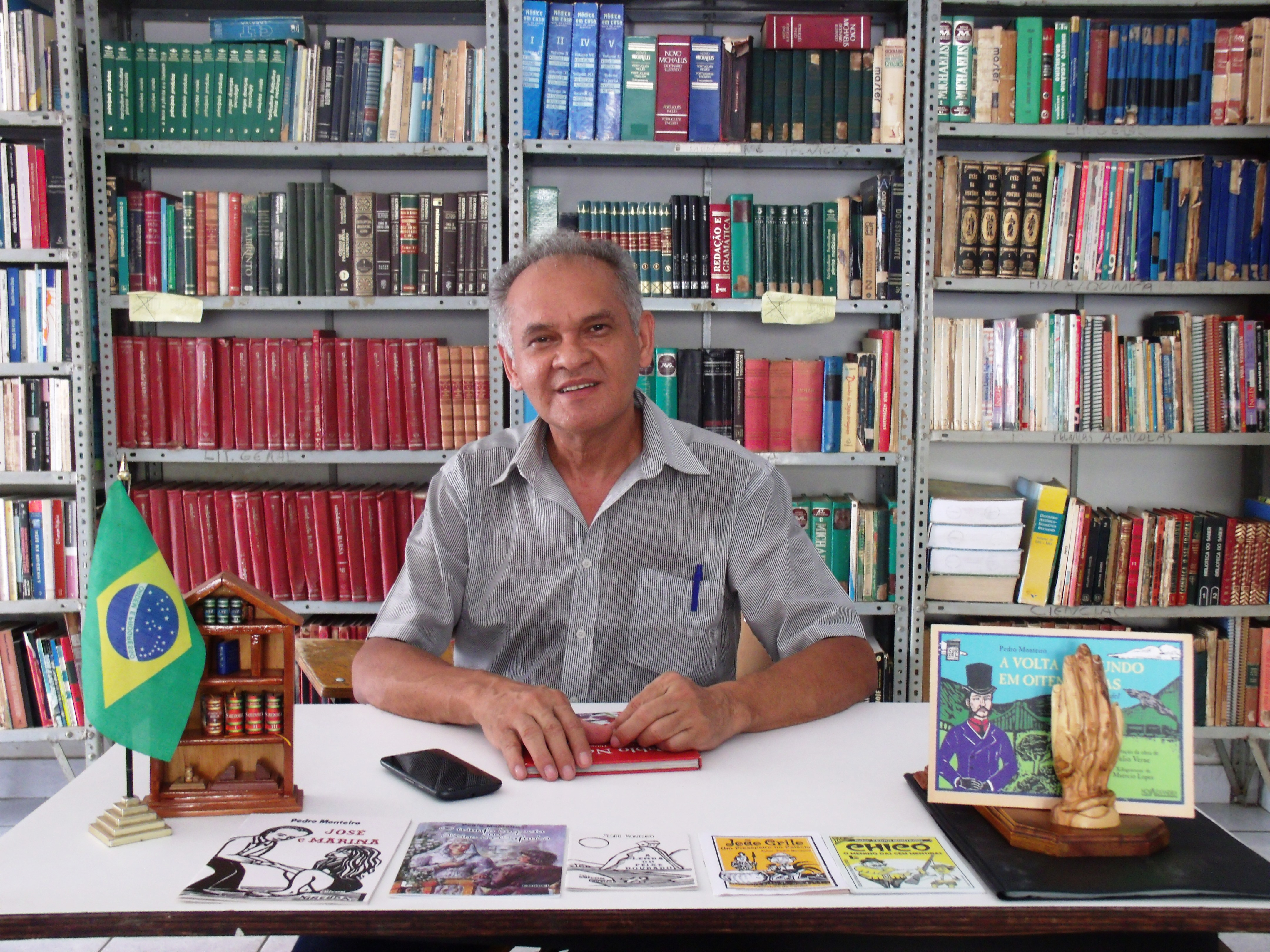 O poeta de Literatura de Cordel, Pedro Monteiro, em um ambiente interior de uma Biblioteca pública Municipal, no Piauí.